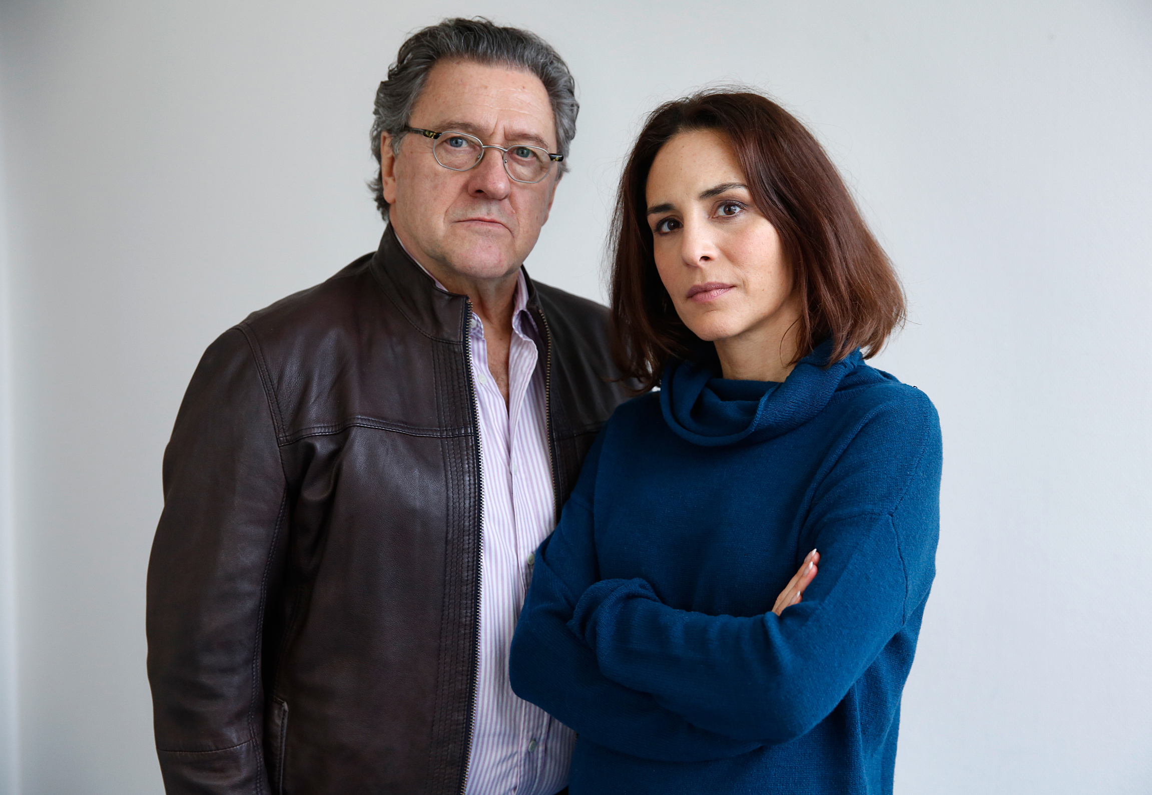 Skådespelarna Tommy Körberg och Alexandra Rapaport.